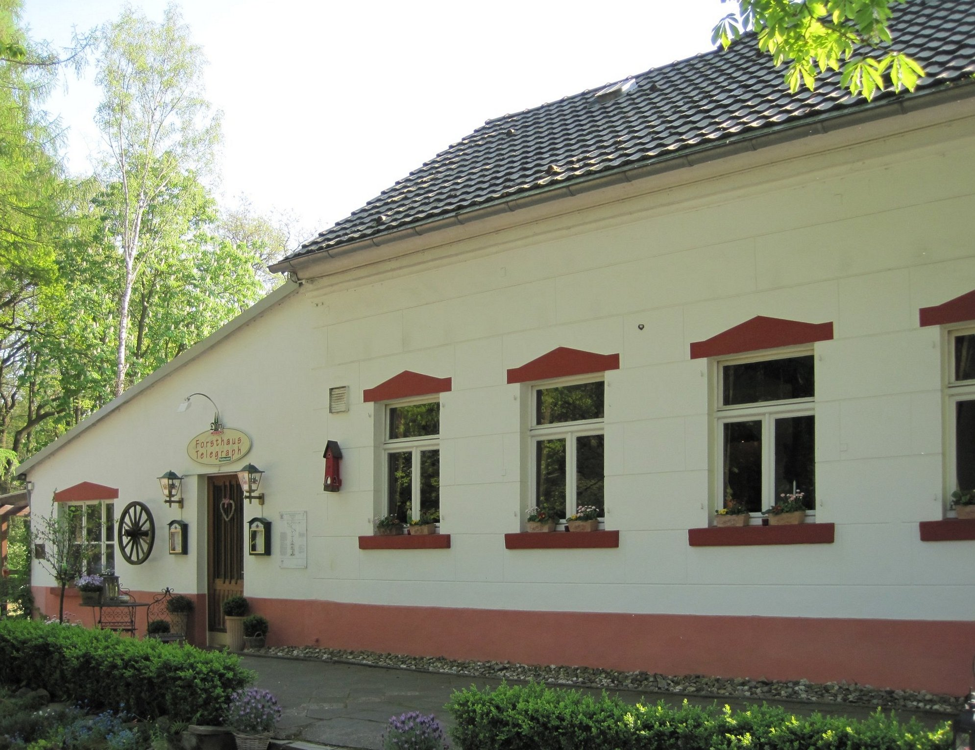 Forsthaus Telegraph bei Troisdorf-Oberlar am Standort des optischen Telegrafen Nr. 53; bewirtschaftet als Gastronomie und gelegen im Naturschutzgebiet „Wahner Heide im Rhein-Sieg-Kreis“